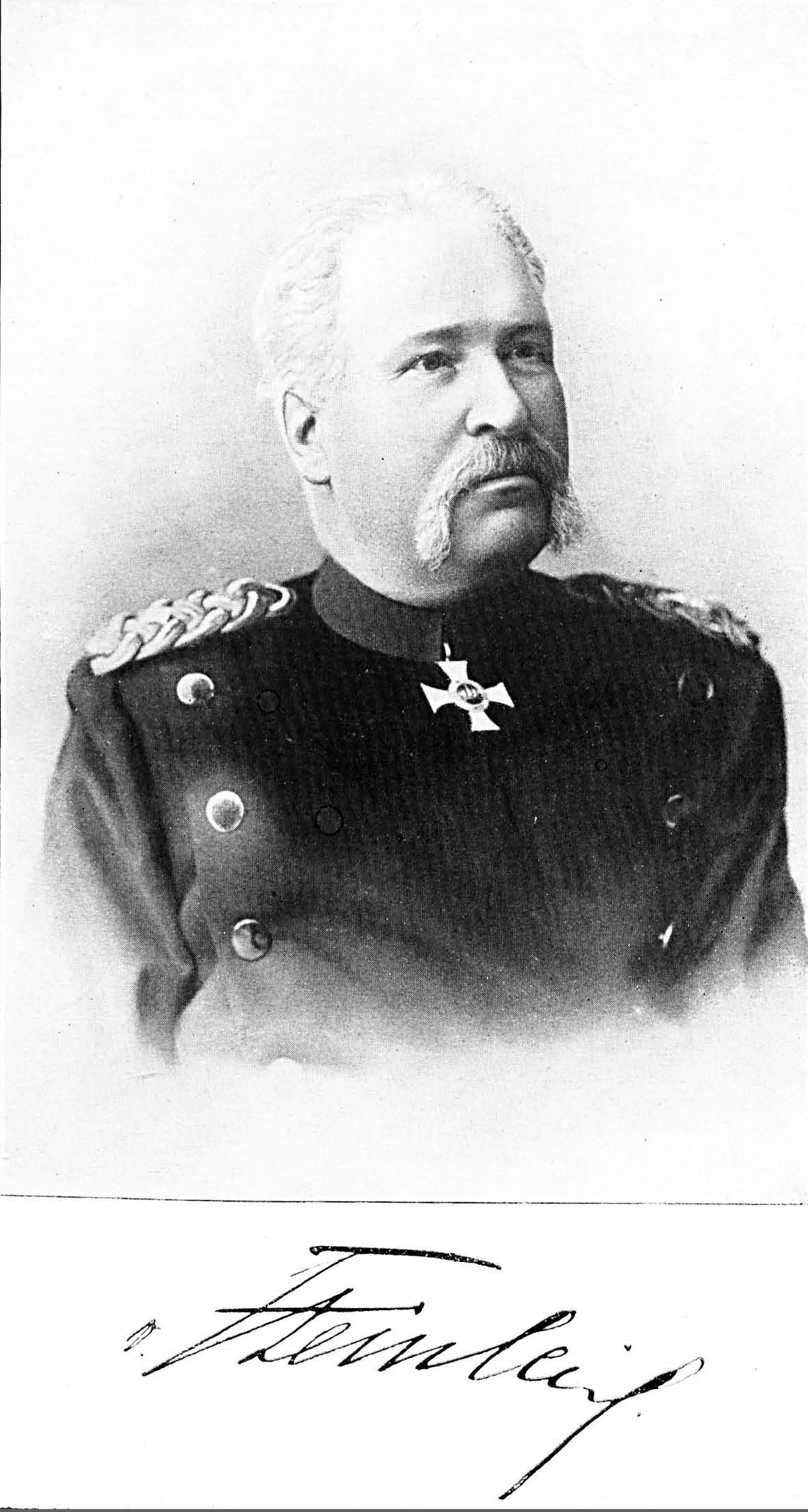 Gustav von Steinheil, Porträt.